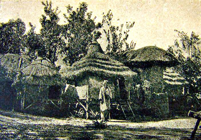 Снимка от Илюстрация Илинден.